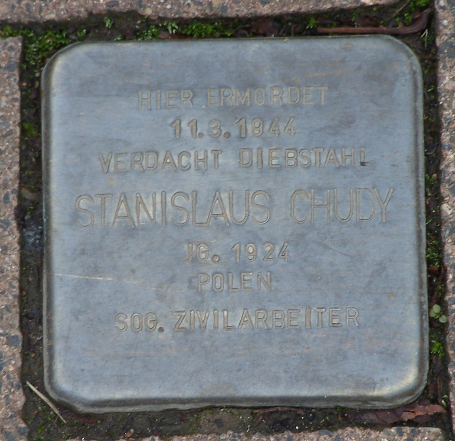 Der Stolperstein in der Mühlhäuserstraße, südlich der Hörselbrücke, westlicher Bürgersteig erinnert an einen Ausländer, der an dieser Stelle 1944 erschossen wurde.